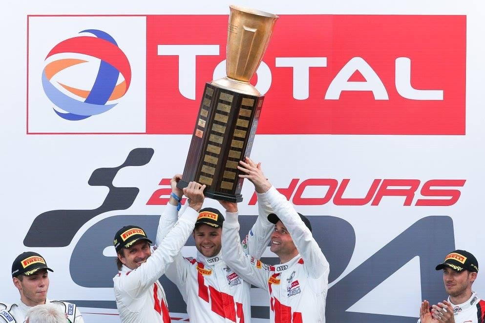 Photographie de (de gauche à droite :) Markus Winkelhock, Jules Gounon et Christopher Haase brandissant le trophée des 24 Heures de Spa 2017.